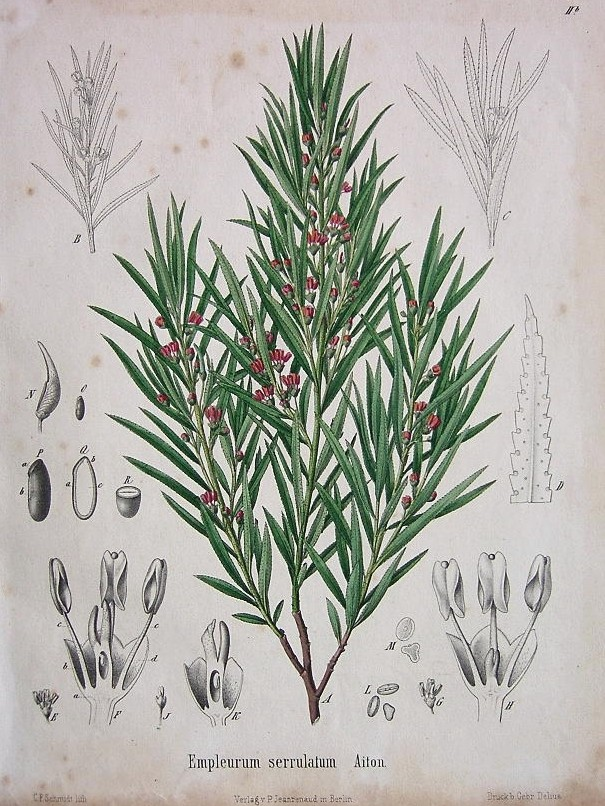 Empleurum unicapsulare (L.f.) Skeels = Empleurum serrulatum Sol. ex Aiton : Aquarel